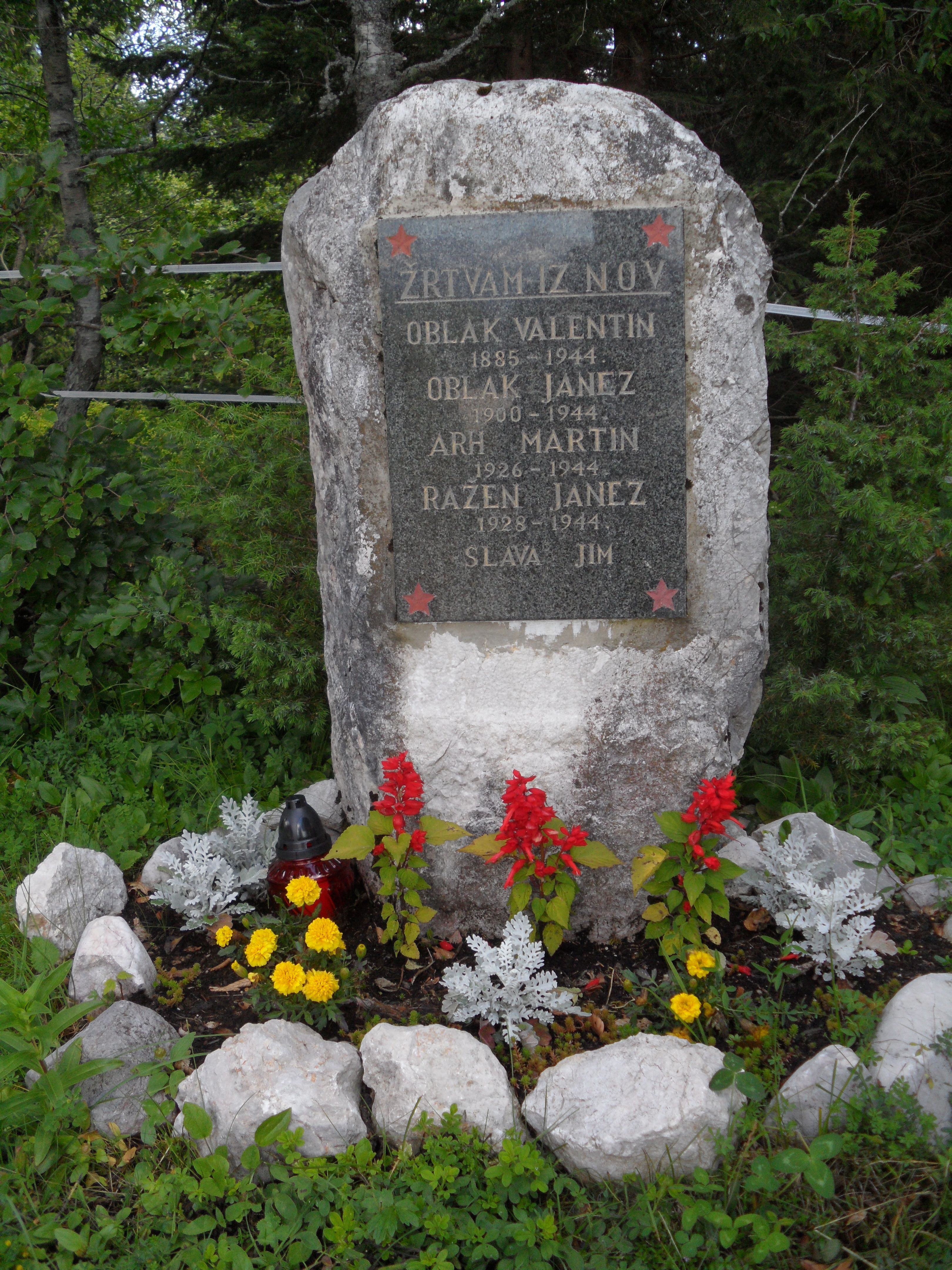 Spomenik na Pokljuki. Napis: Žrtvam iz NOV Oblak Valentin 1885 - 1944 Oblak Janez 1900-1944 Arh Martin 1926 - 1944 Ražen Janez 1928 - 1944 Slava jim